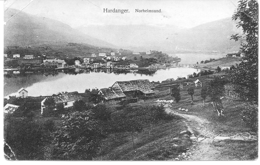 Norheimsund, Kvam, Norway